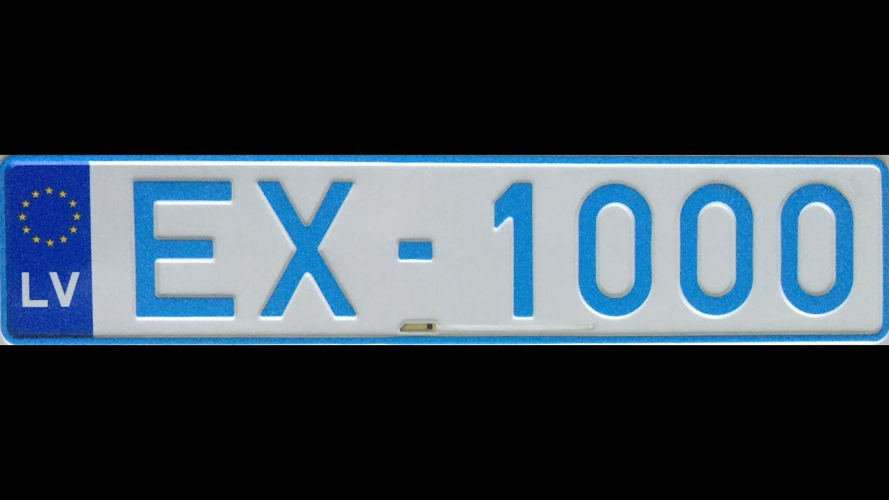 Ar elektrību darbināma transportlīdzekļa numura zīme